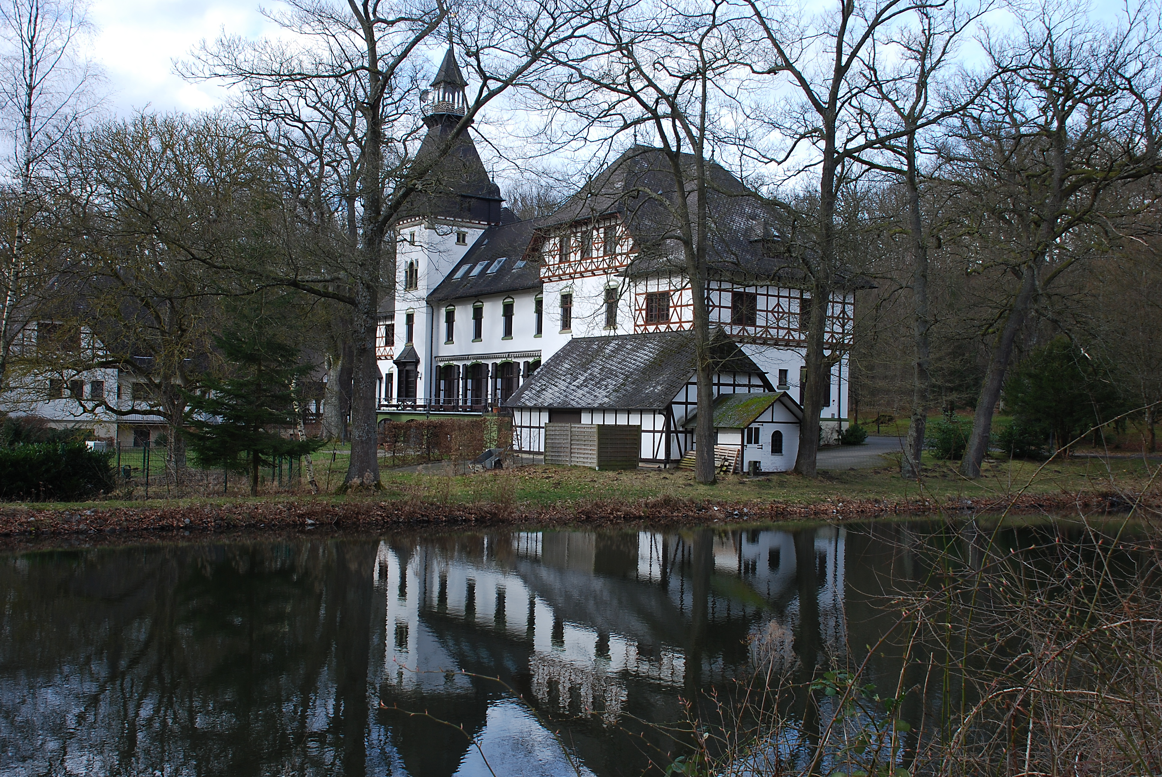 Jagdschloss Sankt Meinolf im Arnsberger Wald bei Neuhaus an der Straße Wilhelmsruh im Ortsteil Stockum der Gemeinde Möhnesee im Kreis Soest in Nordrhein-Westfalen